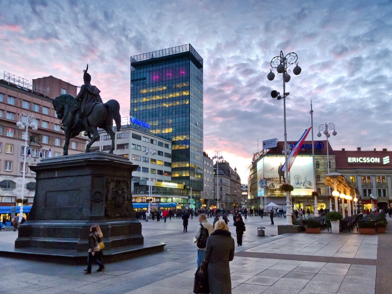 Trg bana Jelačića u Zagrebu